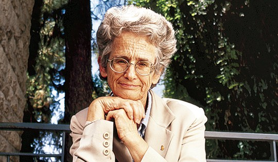 פרופסור למשפטים רות גביזון